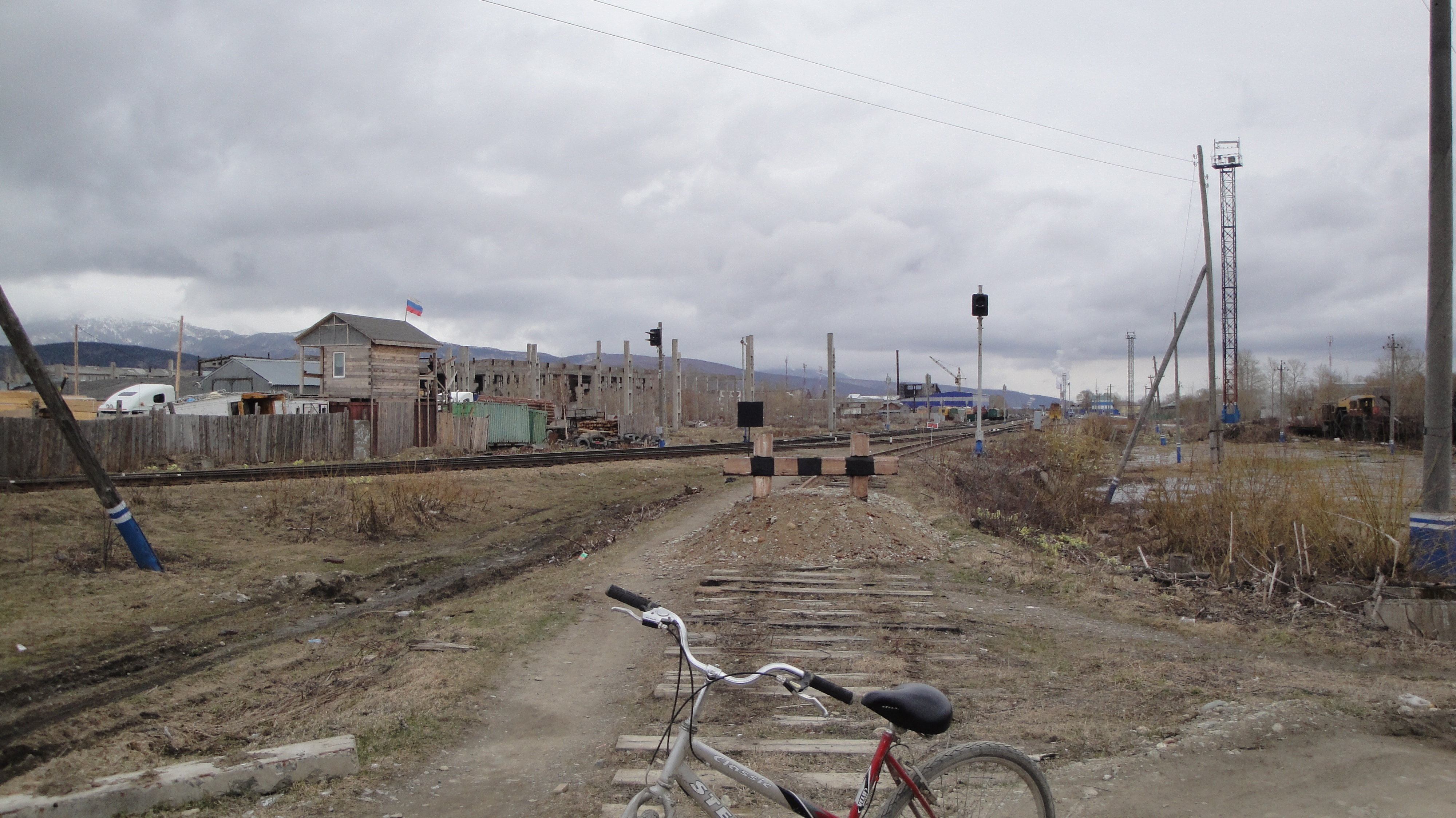 Станция Новоалександровка вид с насыпи бывшей ветки на Синегорск